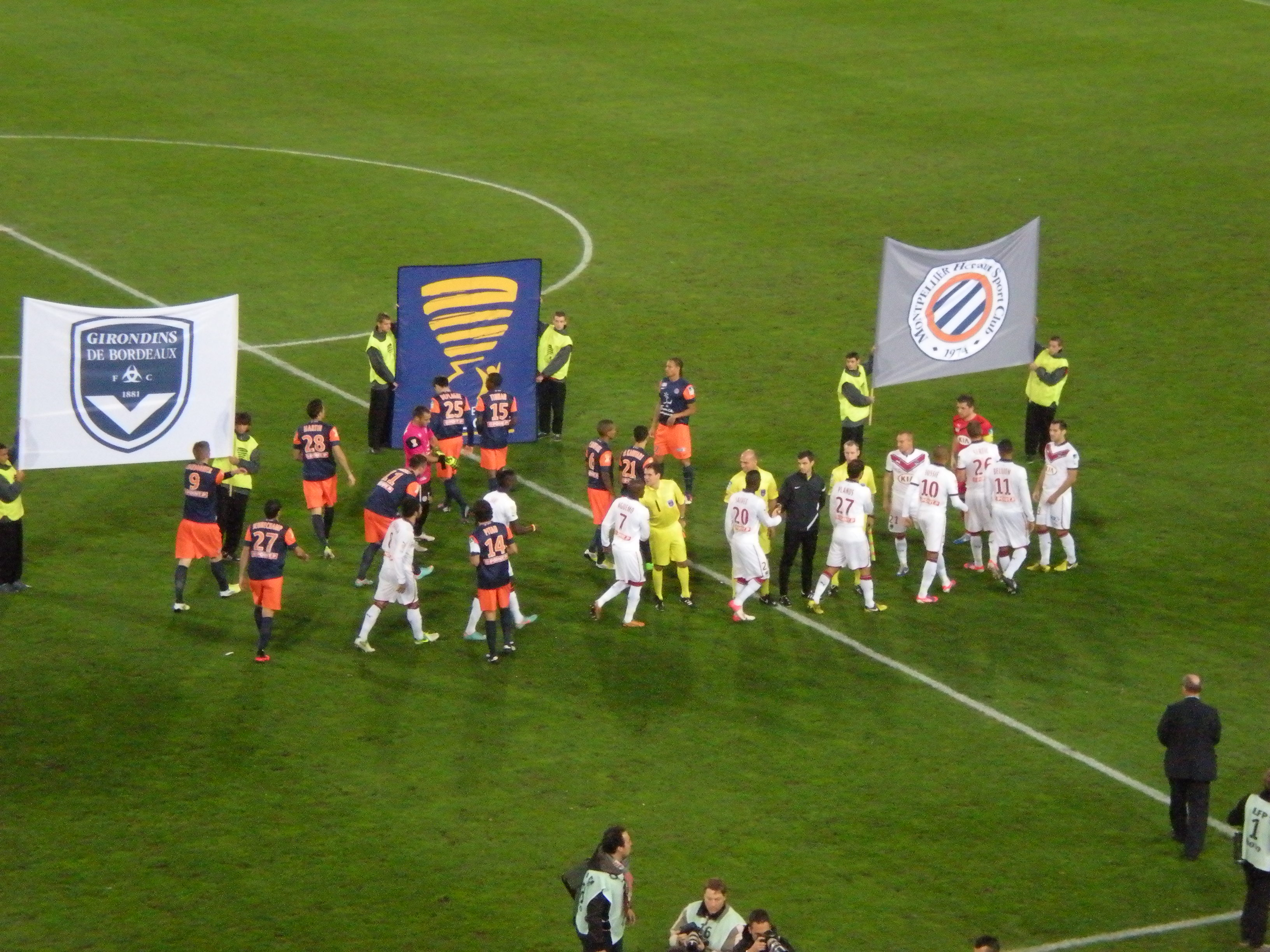 Coupe Ligue 2012-MTP-BORDEAUX, 31 octobre 2010. Présentation des équipes.